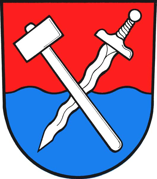 Znak obce Česká Ves